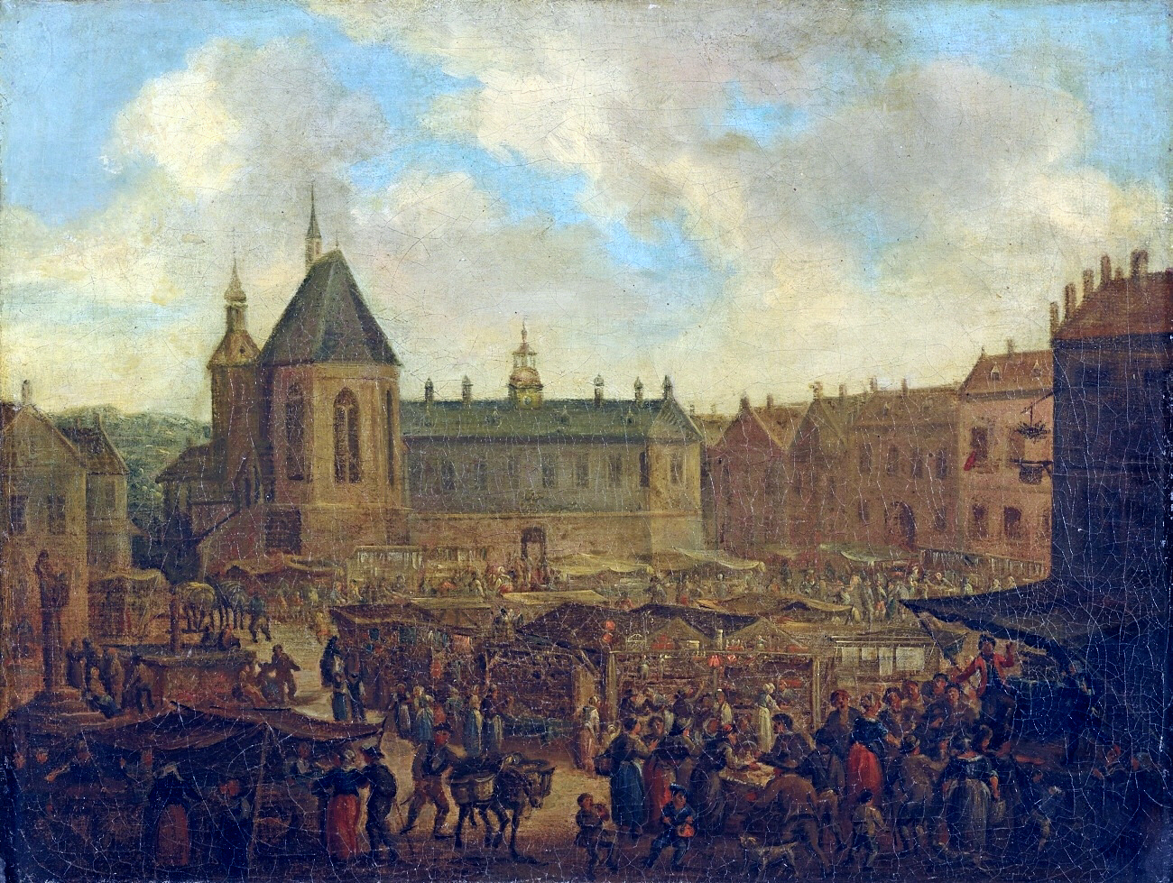 Jahrmarkt mit Quacksalberbühne. Niederlande, spätes 17. Jahrhundert. Aus der privaten Sammlung des Theaterwissenschaftlers Carl Niessen.